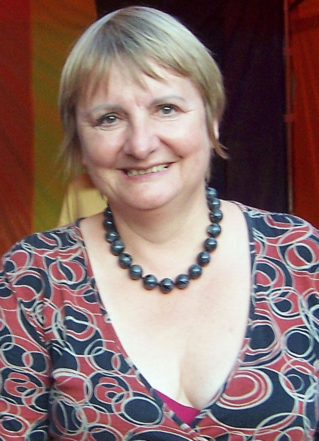 Vera Lengsfeld, 15.08.2009